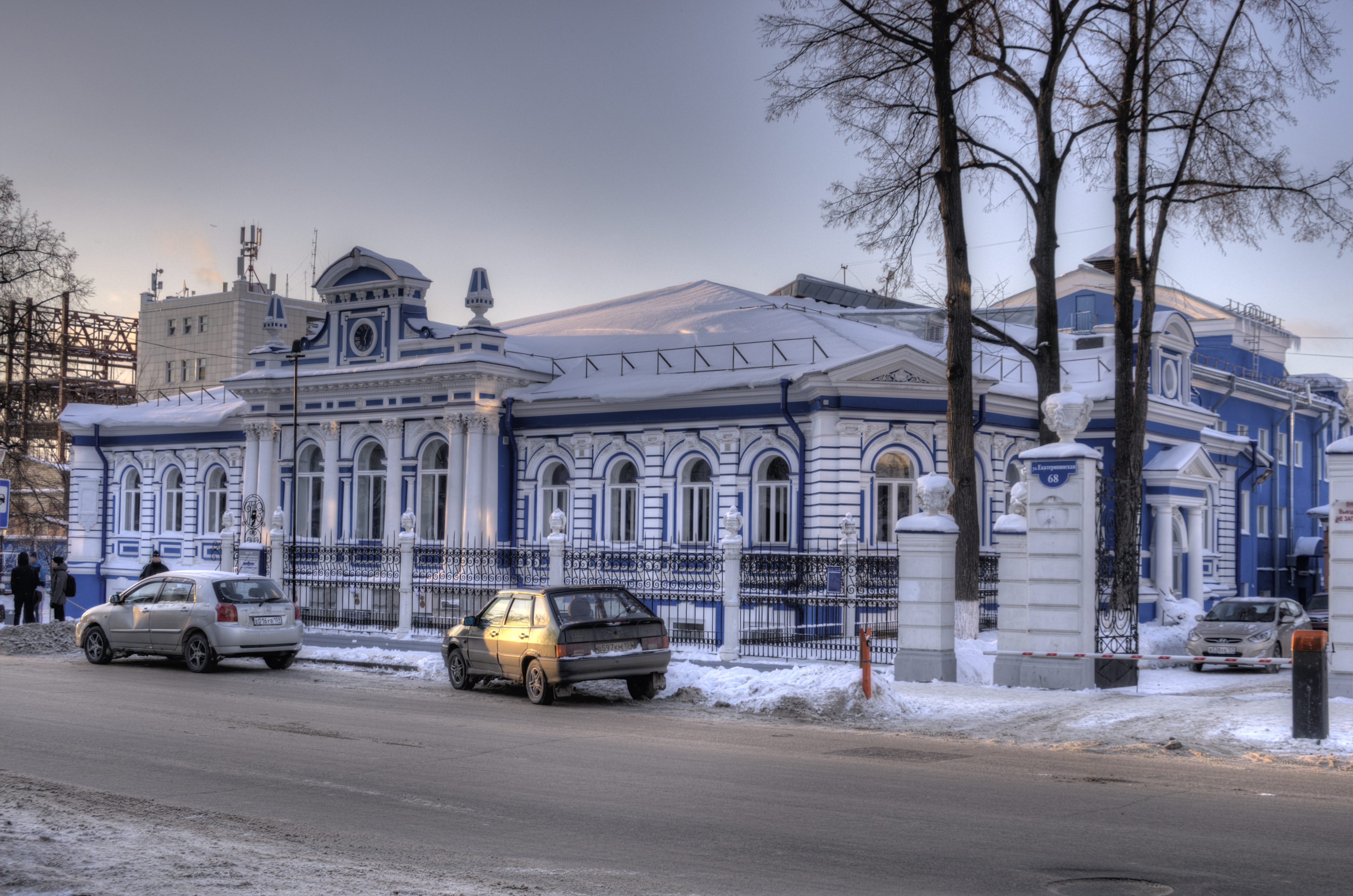 Дом пароходчика Любимова (Пермский край, Пермь, улица Екатерининская, 68)